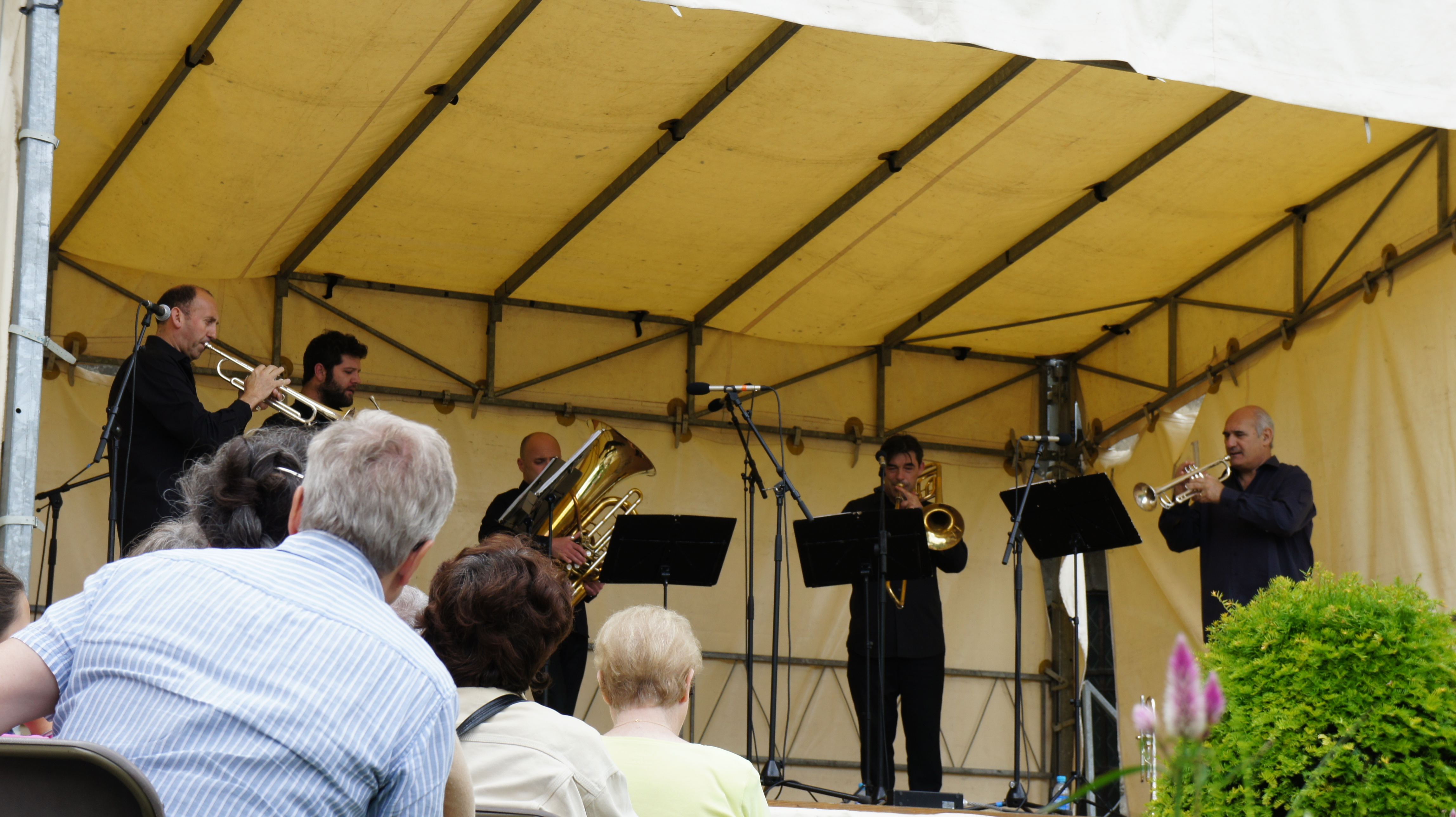 lors des Flâneries musicales 2013, jardin Deneux .